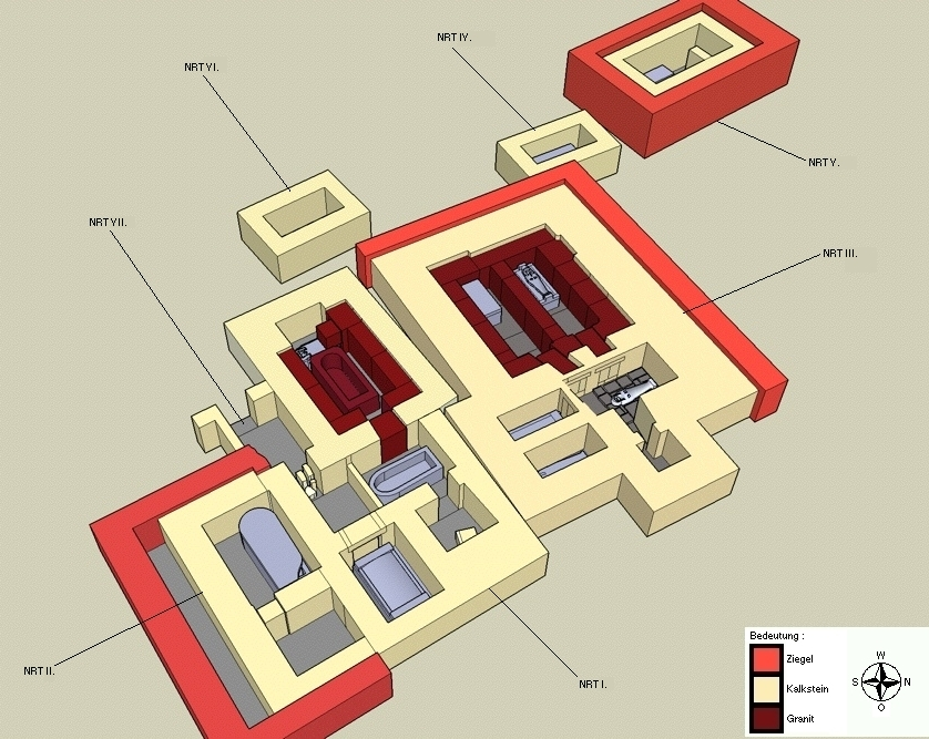 Die königliche Nekropolis von Tanis - 21. und 22. Dynastie